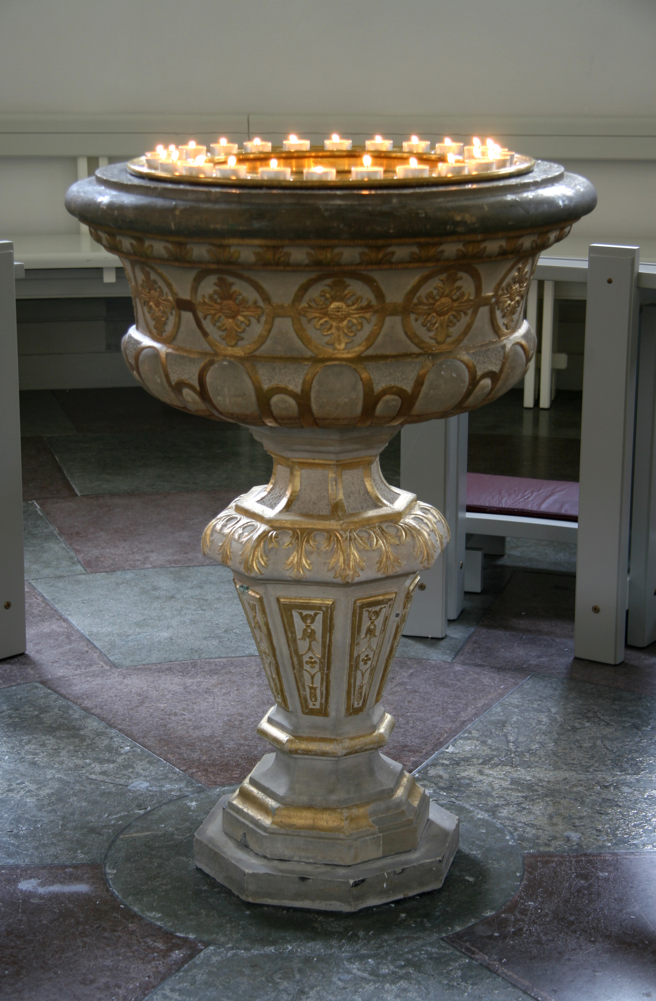 Helligåndskirken, Copenhagen, Denmark. Old baptismal font by Diderik Gercken. 1730. Now in chapel.